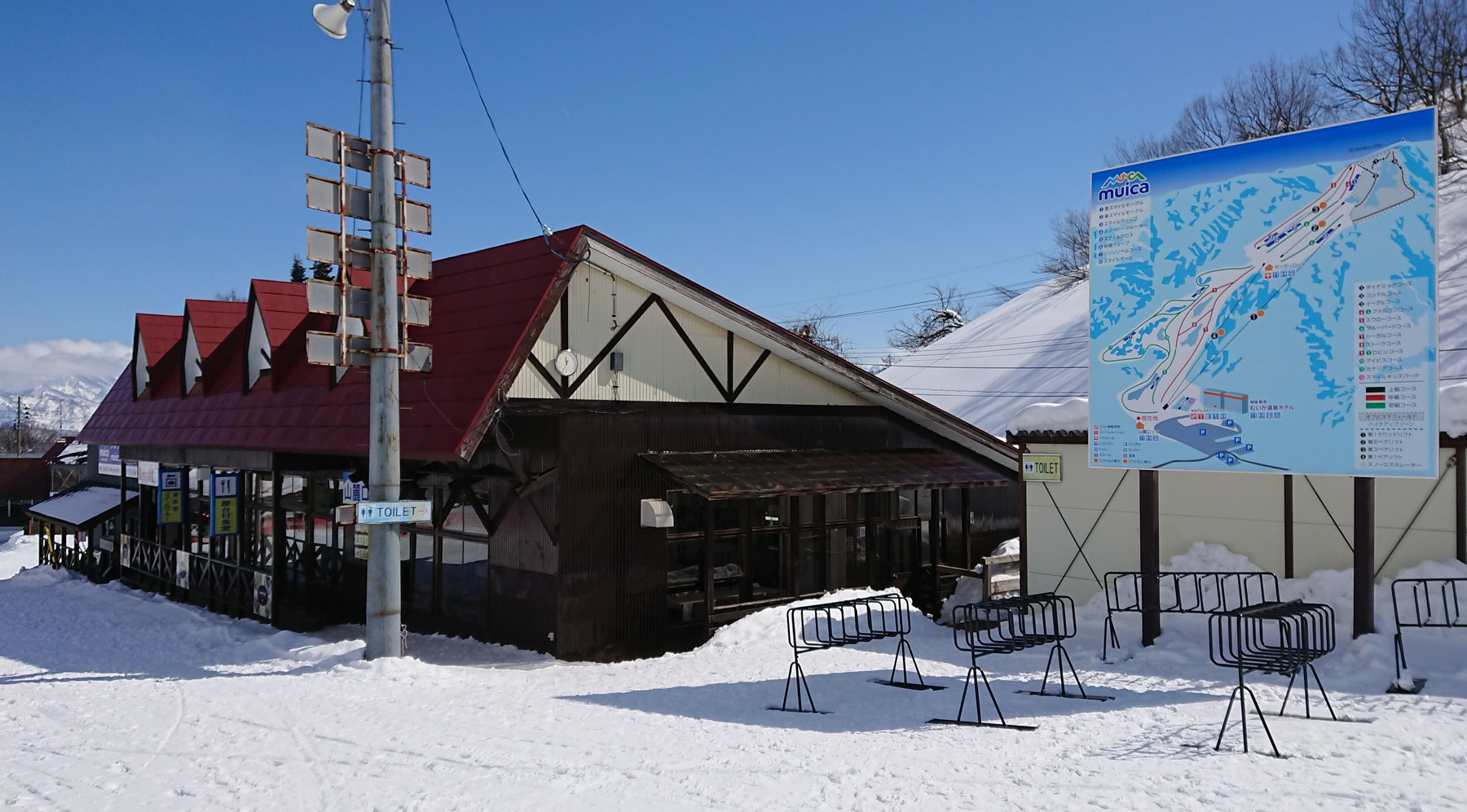 ムイカスノーリゾート 山麓ロッジ 2018年2月撮影